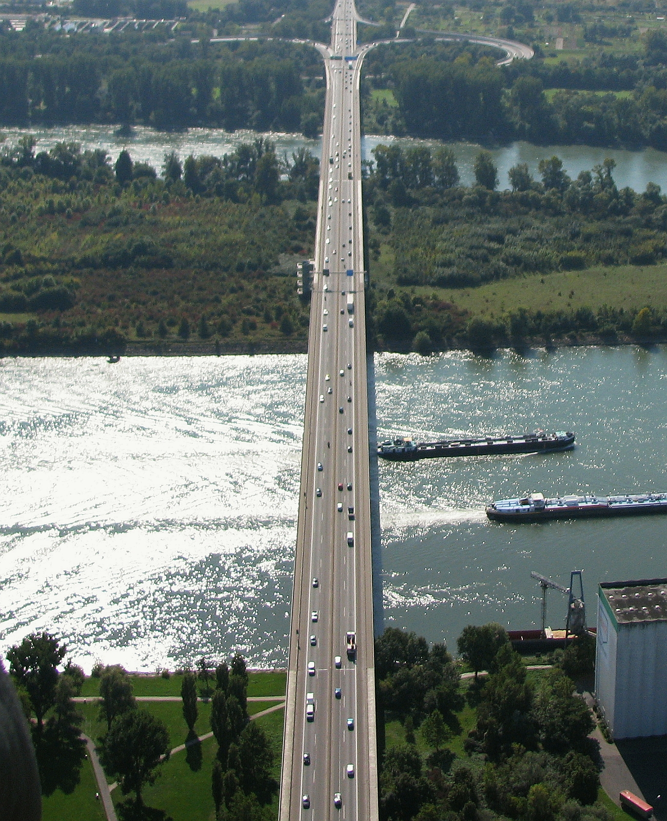 Wiesbaden Luftbild Schiffahrtsstraße wird von Luftstraße und Autostraße gekreuzt Foto 2008 Wolfgang Pehlemann Wiesbaden IMG_0249